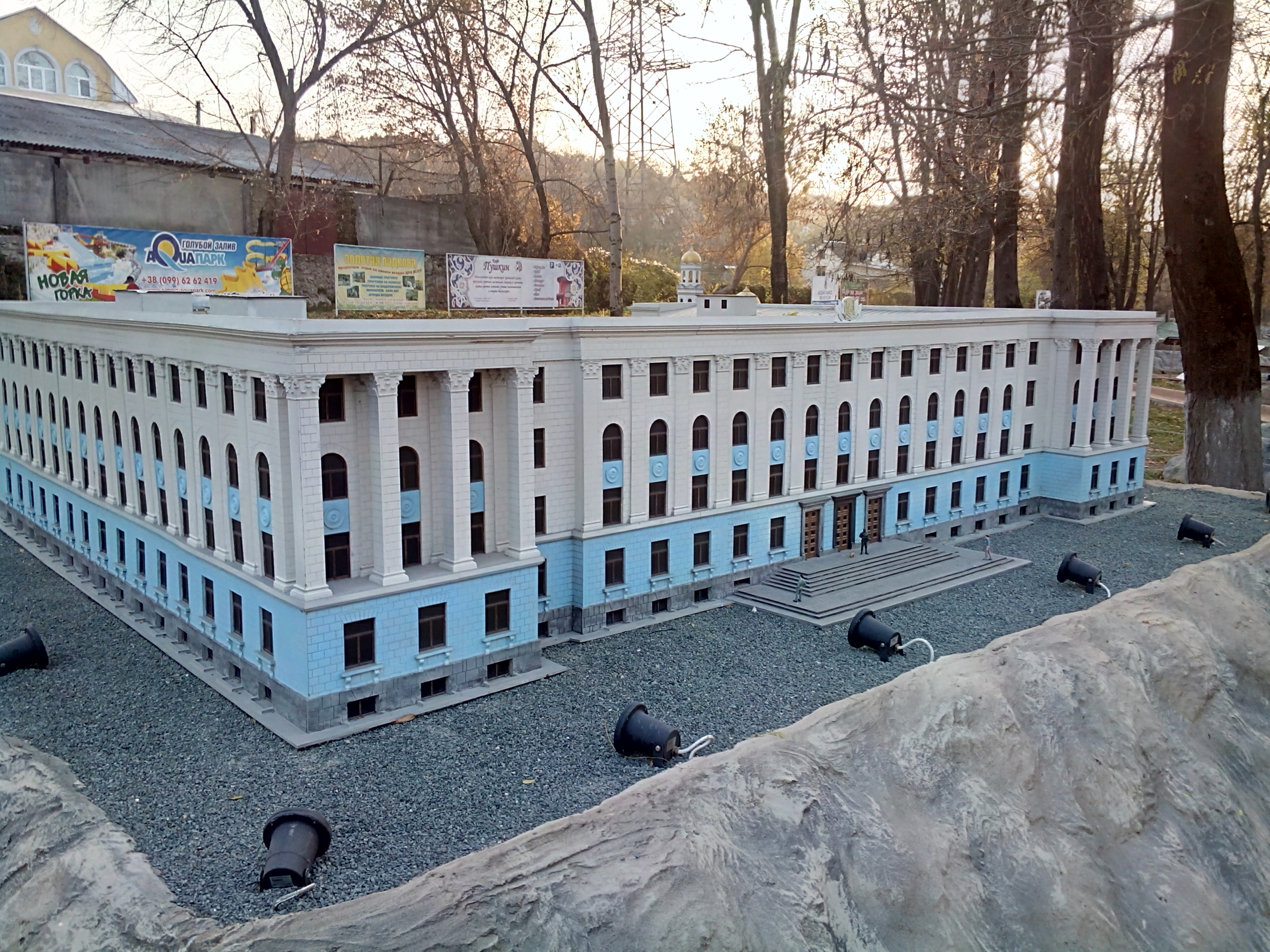 Симферопольский Кабмин